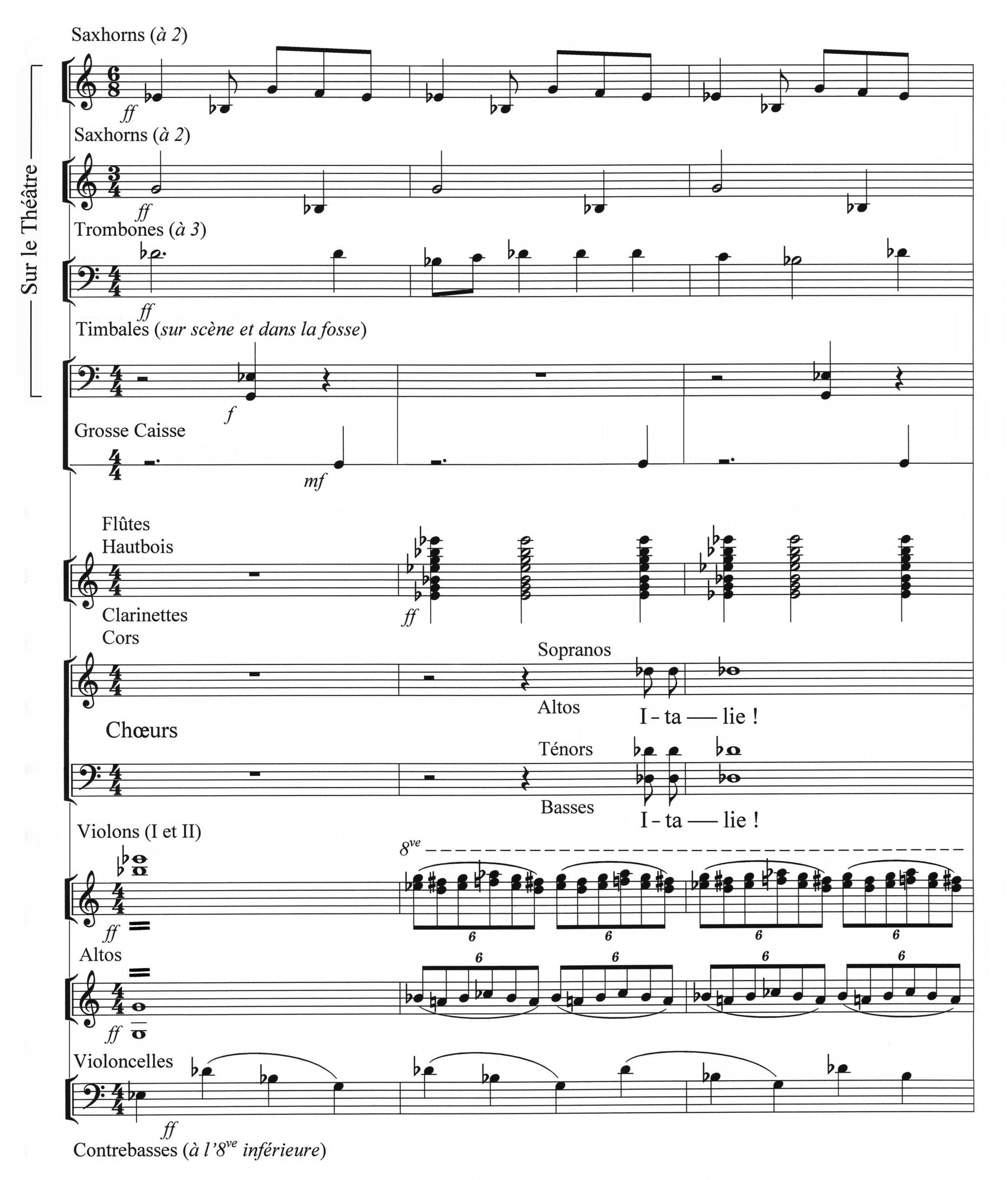 Berlioz - "Les Troyens" - Chasse royale et orage